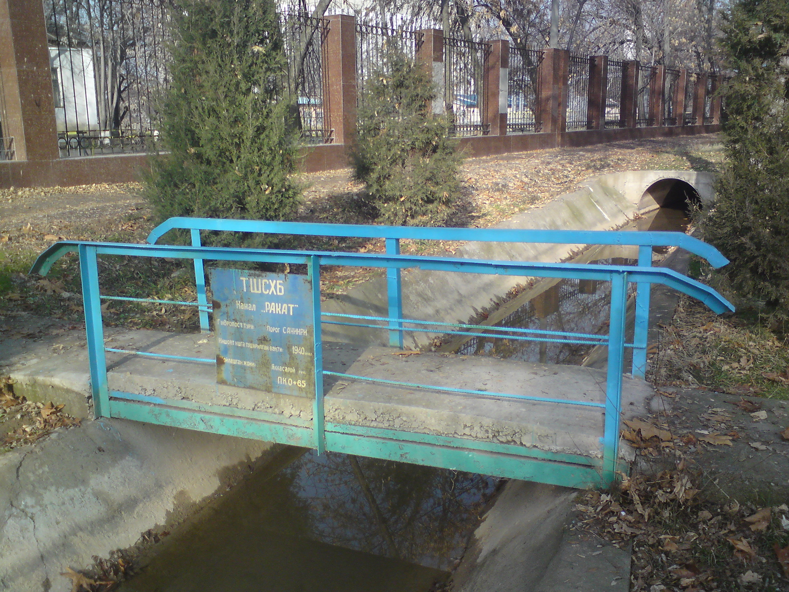 Канал Ракатбоши (Ракат), около Бурджарской ГЭС (город Ташкент)